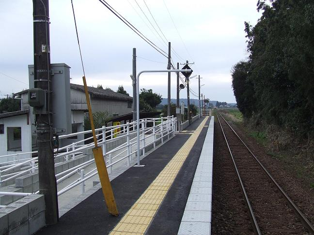 JR吉都線の駅の写真